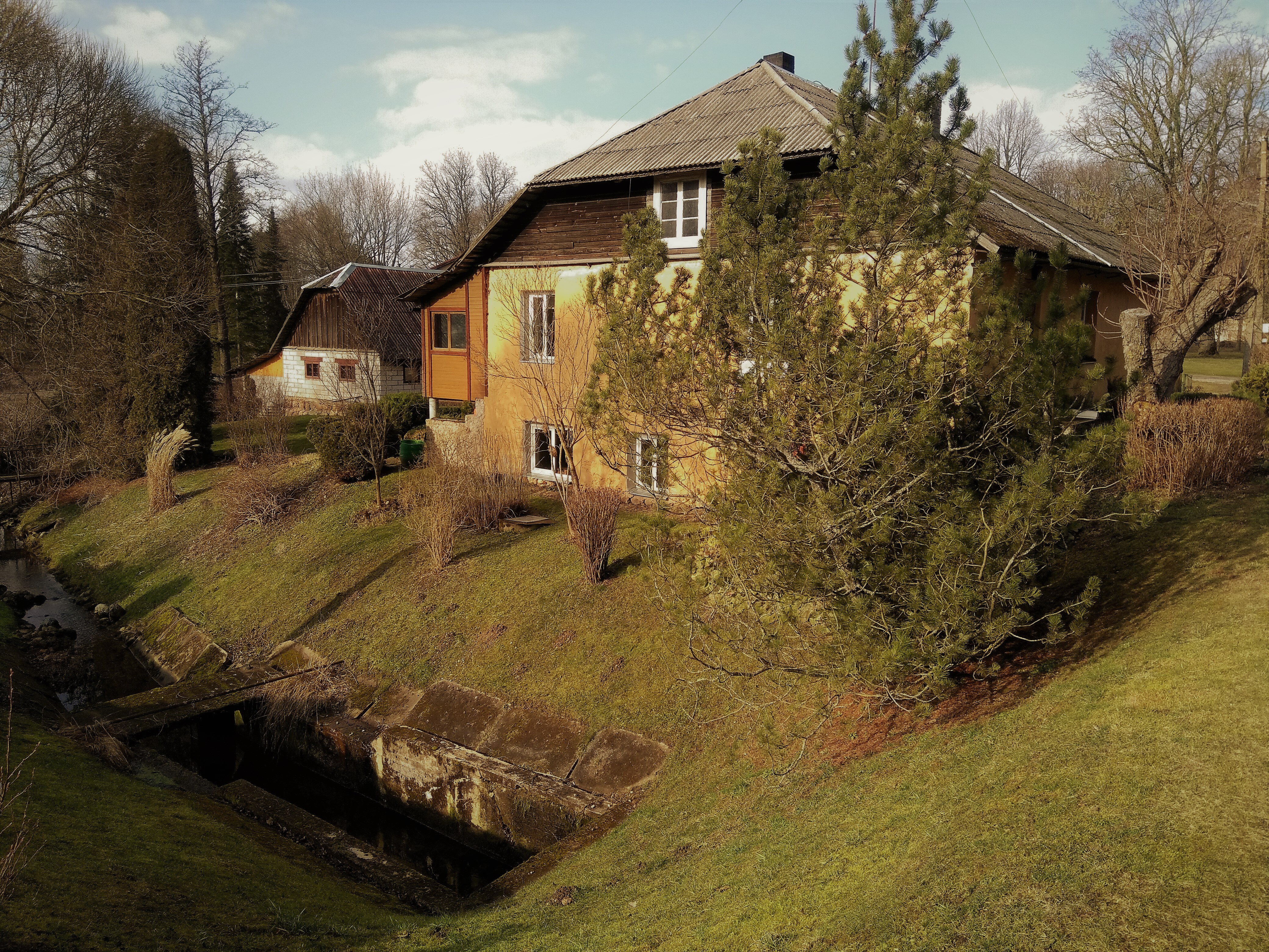 Vaade linnuseala loodenurgast loodesse endise linnuseveski asukohale.